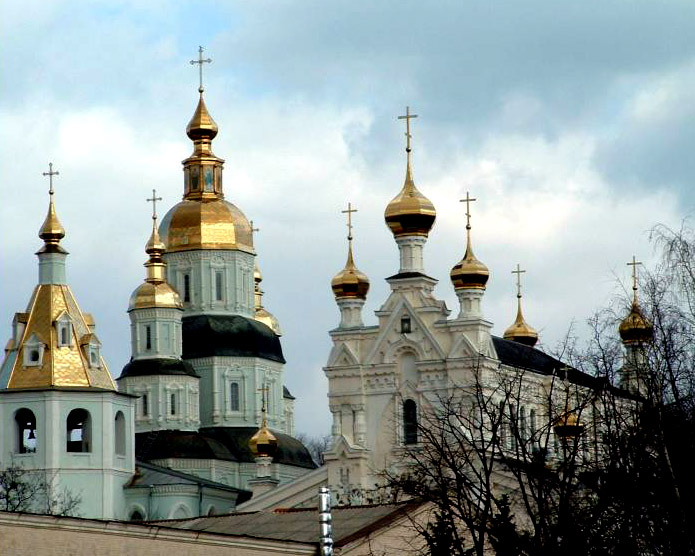 Покровский собор (Харьков) и церковь Озерянской Божией Матери